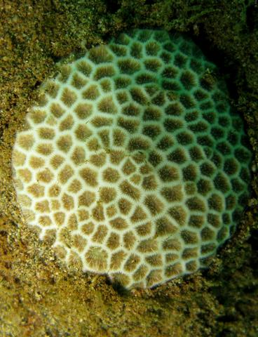 Pseudosiderastrea tayamai en Nueva Caledonia